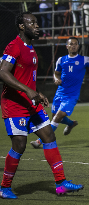 Nicaragua vs Haití repechaje para Copa de oro de la CONCACAF. Marzo 2017. Victoria de Nicaragua